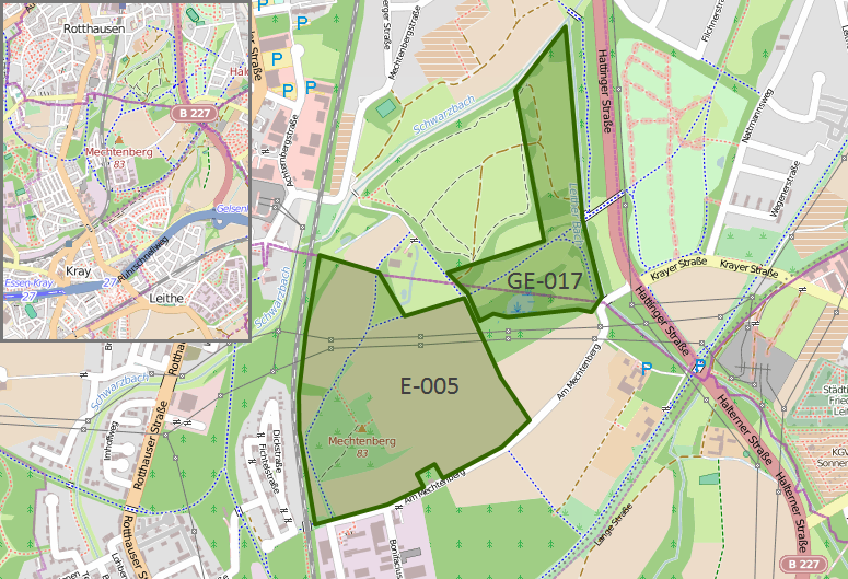 Naturschutzgebiete Mechtenberg (Karte)